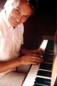 Picture taken in restaurant "Telegrafen" in Drøbak, Norway, © 2002 Robert E. Haraldsen.